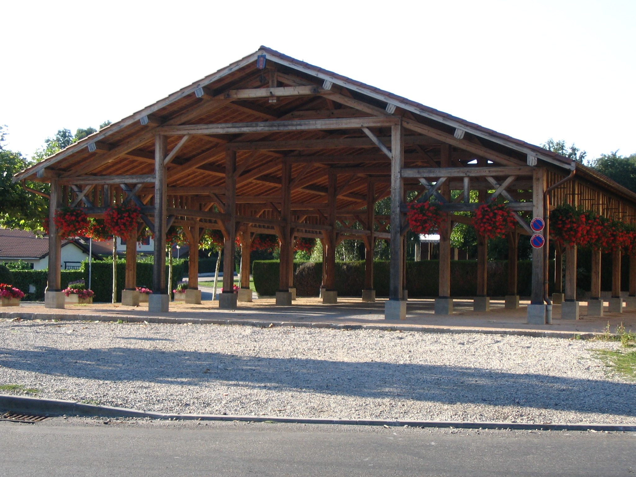 HALLE DE SAINTE-CROIX AIN FRANCE. Prise vers 2005. Auteur: André Jusselme (cf article sur Sainte-Croix Ain). Licence